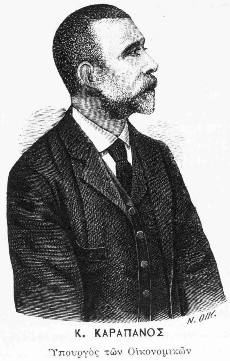 Griechische Persönlichkeit 19. Jahrhundert